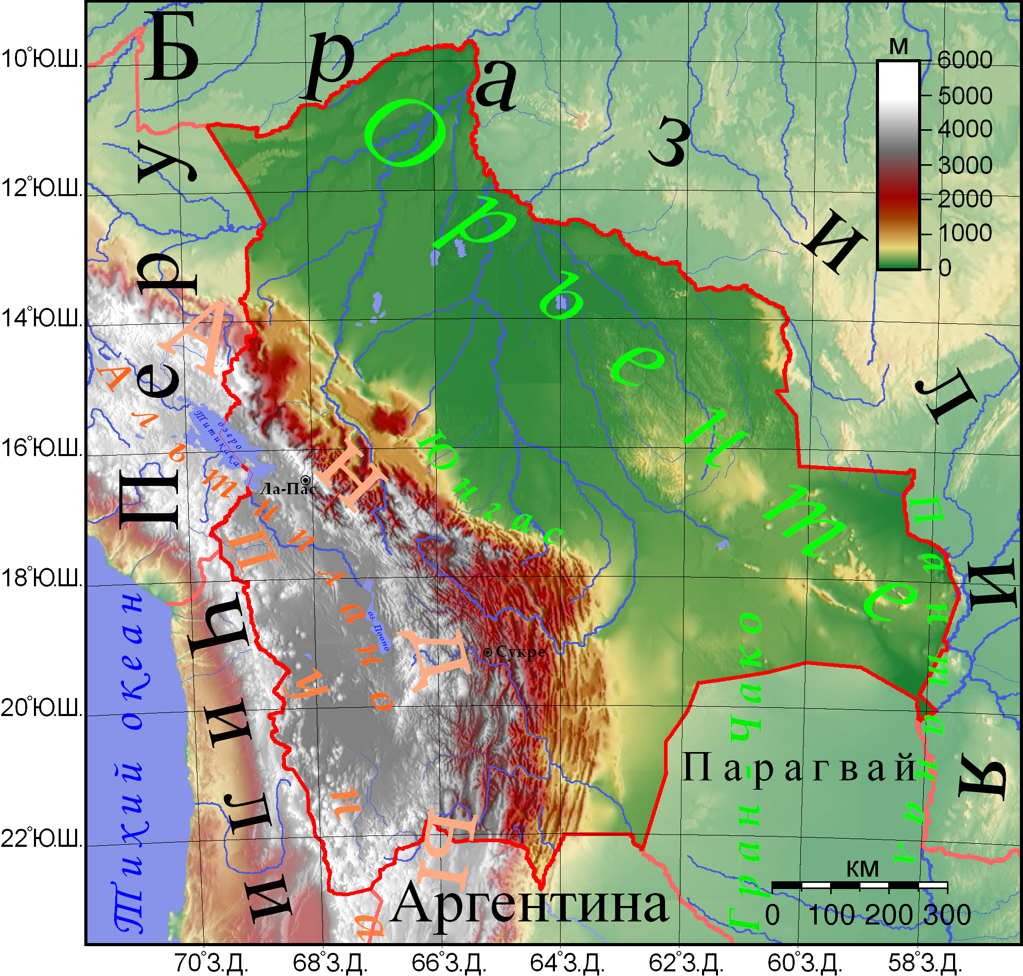 физическая карта Боливии